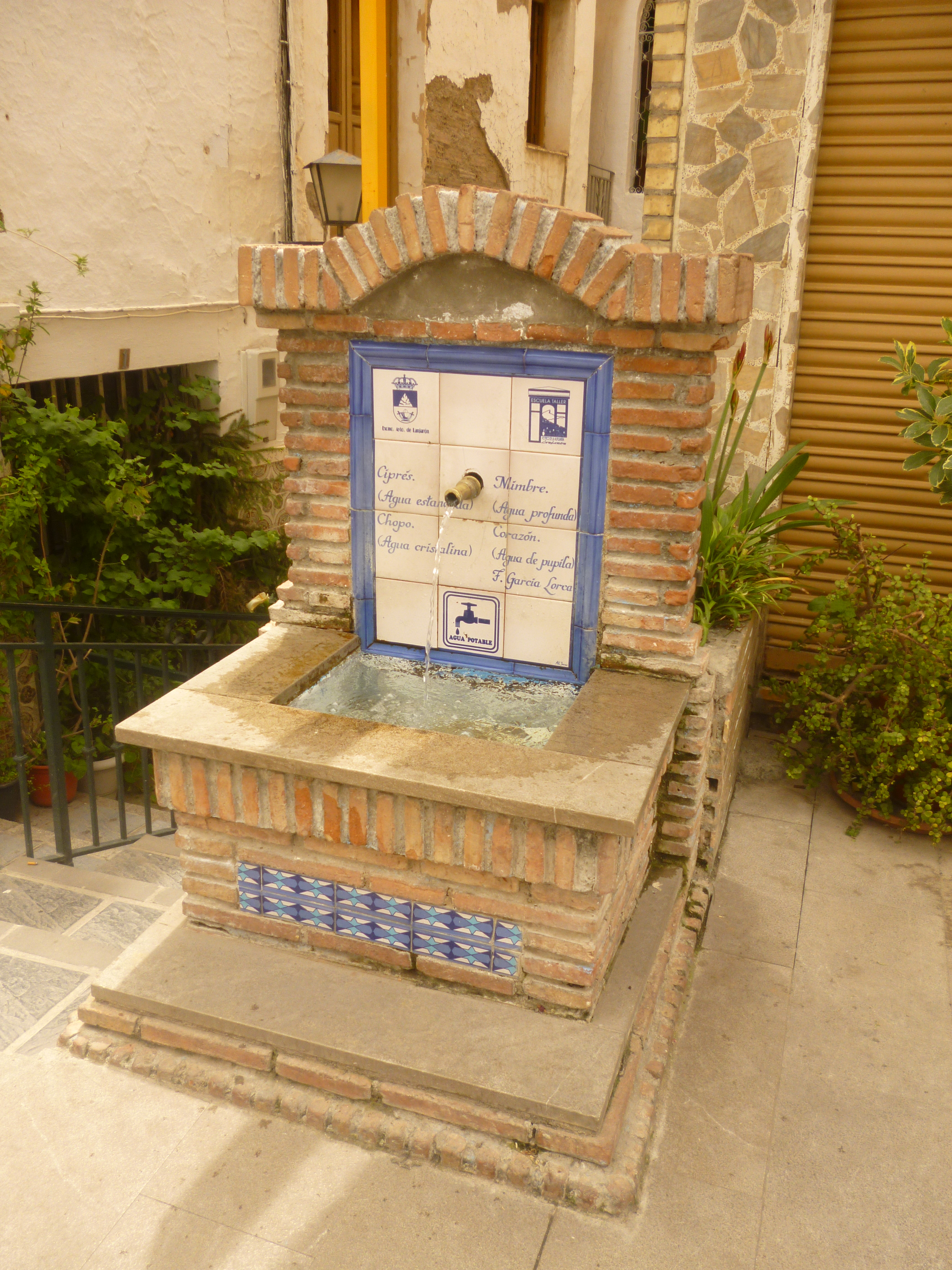 Fuente de agua en Lanjarón. Texto en la fuente: Ciprés. (Agua estancada) Chopo. (Agua cristalina) Mimbre. (Agua profunda) Corazón. (Agua de pupila) --Federico García Lorca